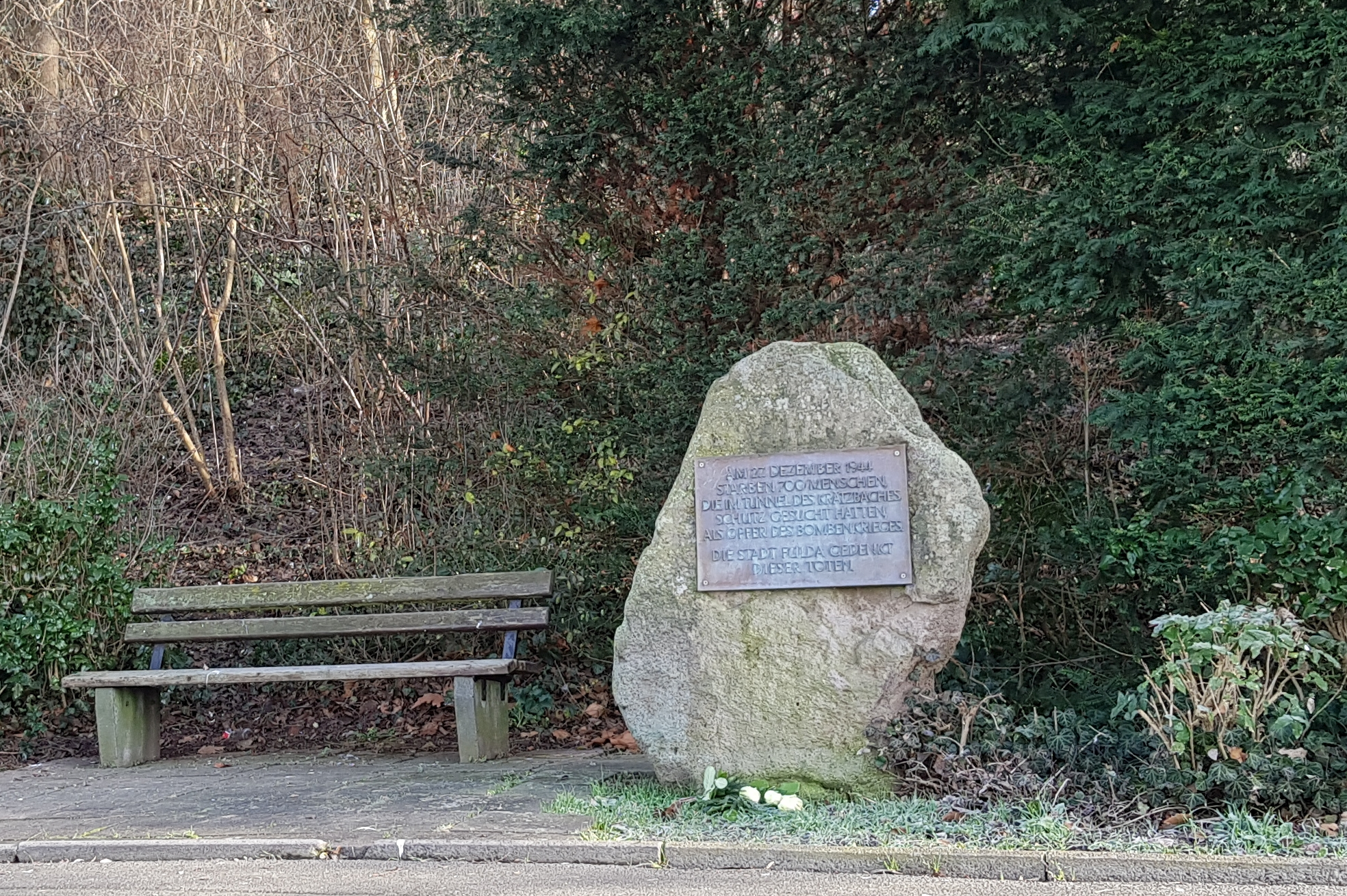 Gedenkstein zum Gedenken der Opfer im Krätzbachtunnel beim Luftangriff am 27. Dezember 2019. Standort: Mehlerstraße, Fulda